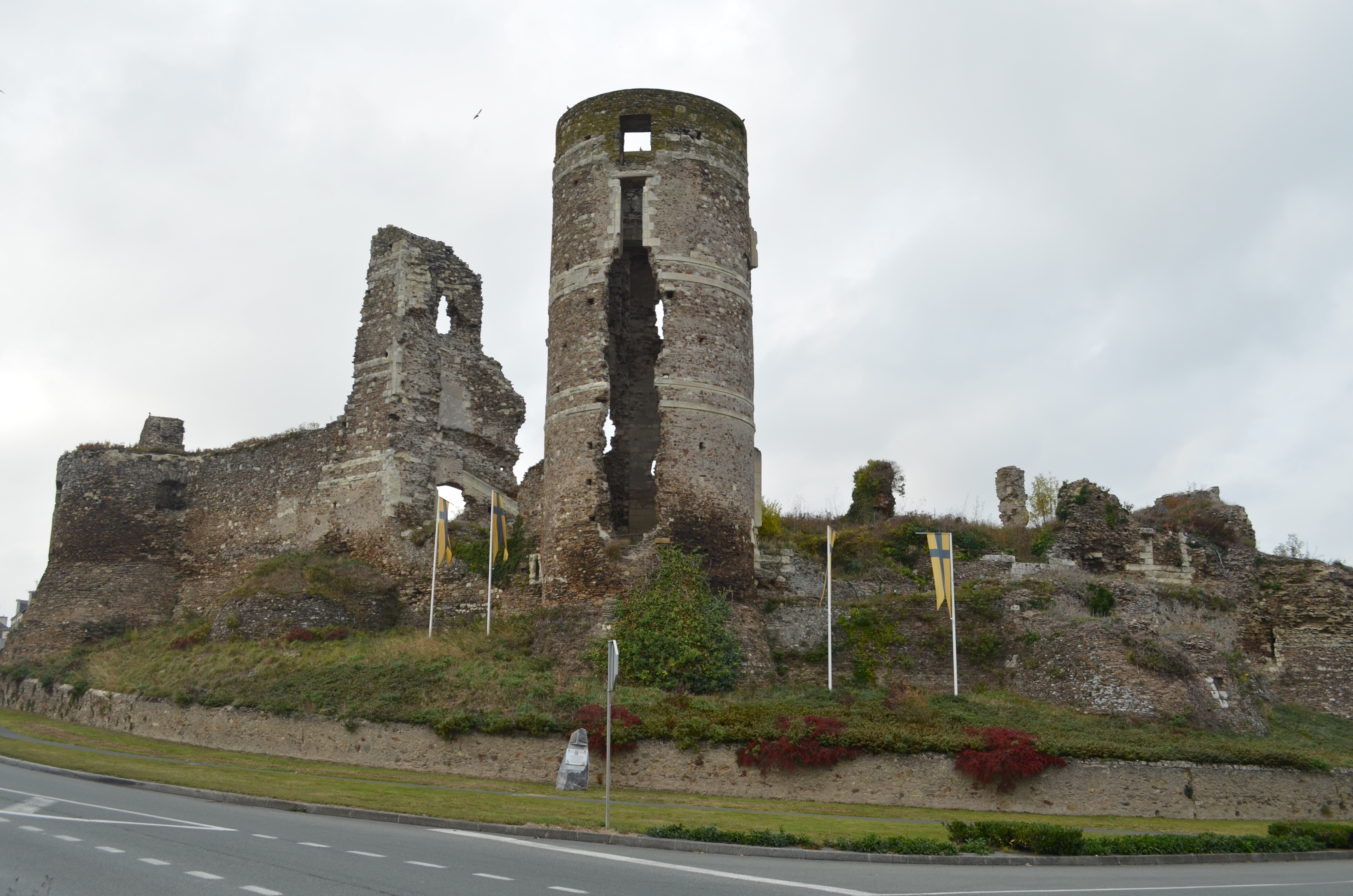 Ruines du Château - Champtocé-sur-Loire (Maine-et-Loire)